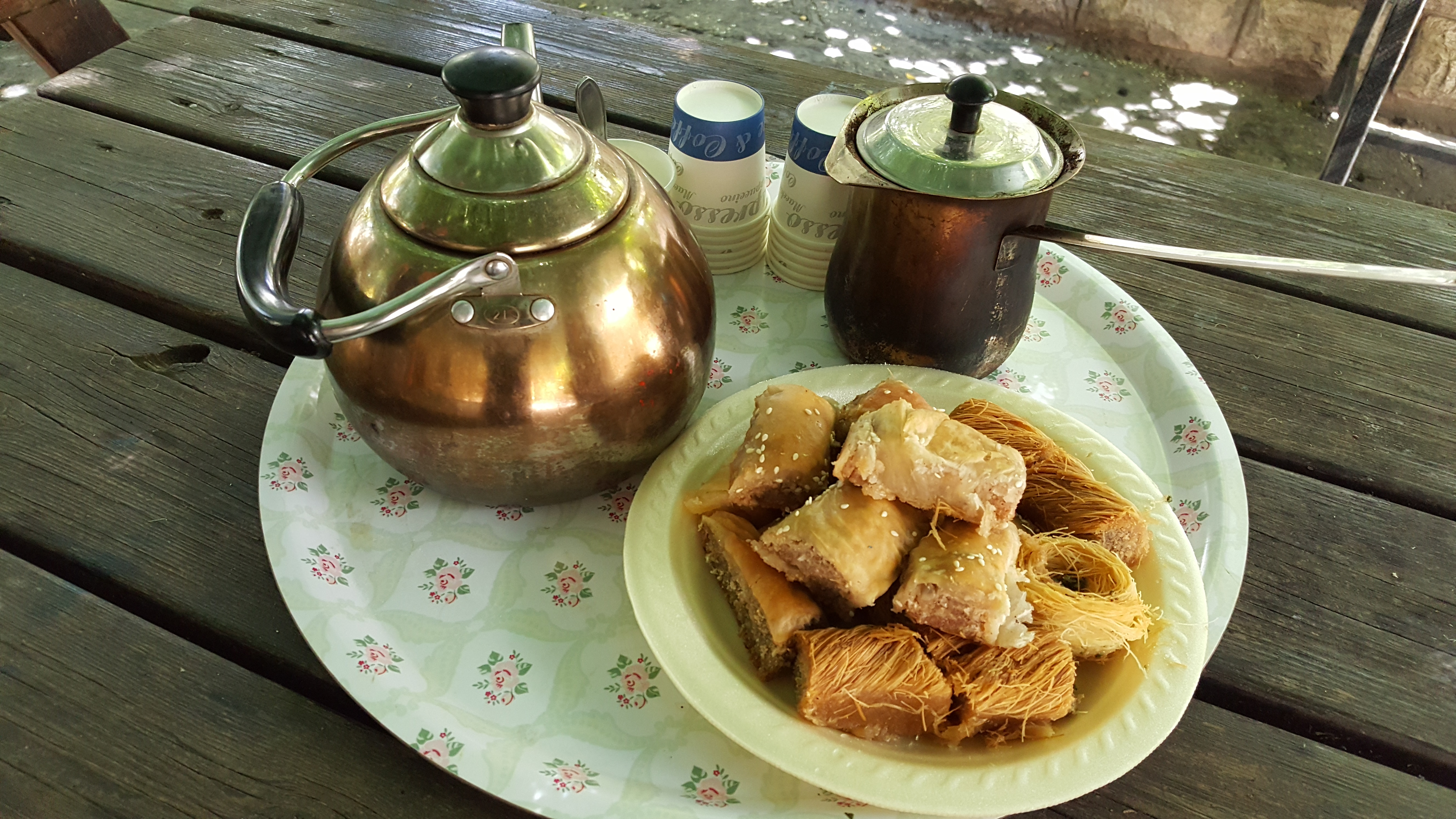 מרכז מבקרים המנוהל על ידי עמותה, ששימורו החל לפני כעשור שנים. המרכז ממוקם במבנה הקרוי "בית רחל ינאית" על שמה של רעיית נשיא מדינת ישראל לשעבר, רחל ינאית בן-צבי. תפקידו של המרכז להנציח ולשמר את מורשת יהודי פקיעין ואת מורשת משפחת זינאתי עתיקת-היומין. מרגלית זינאתי, הנצר האחרון למשפחה, מתגוררת במבנה ושומרת על בית הכנסת העתיק בפקיעין הממוקם בסמוך.